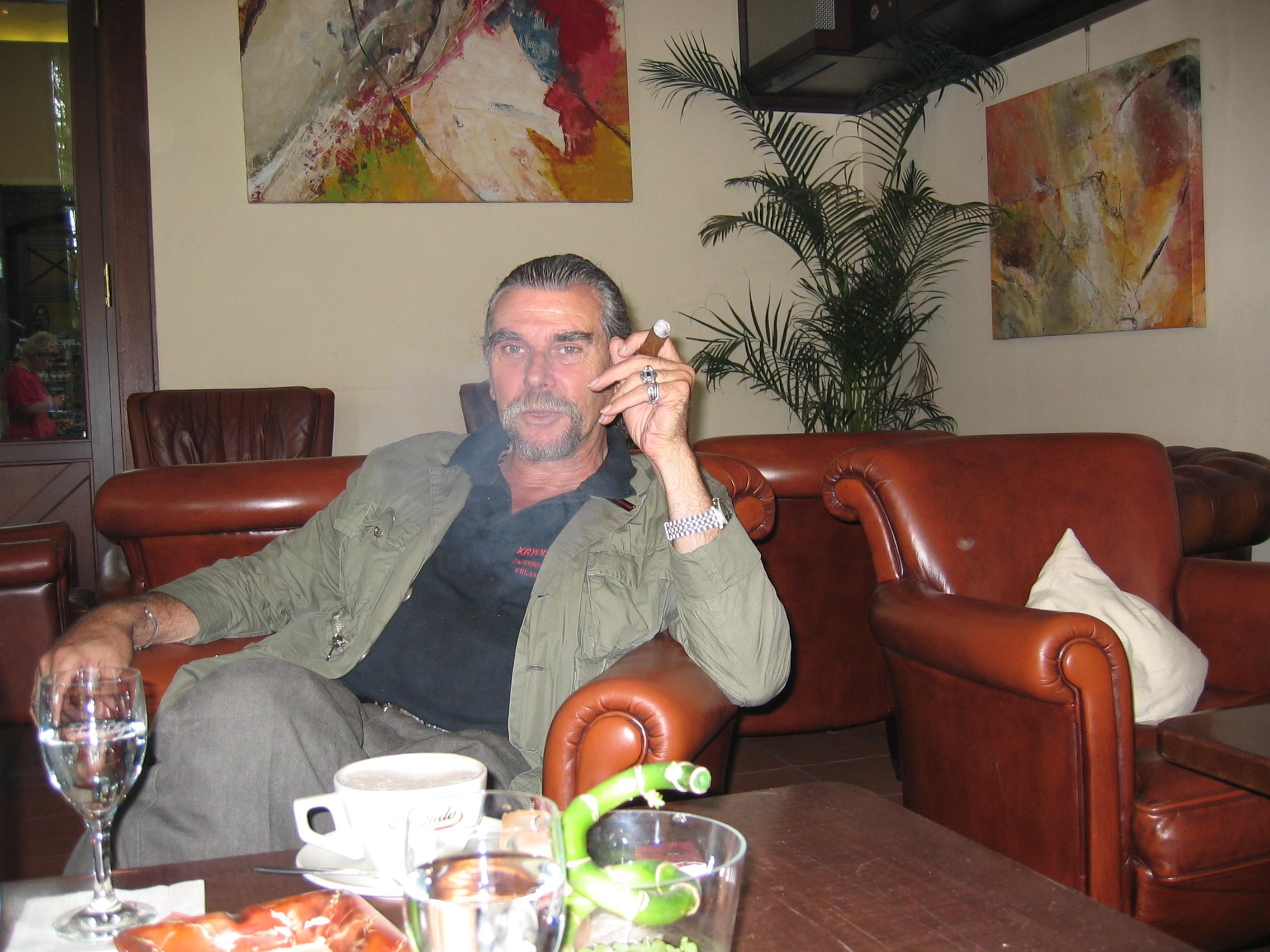 Rolf Liccini Kamerann & Regisseur